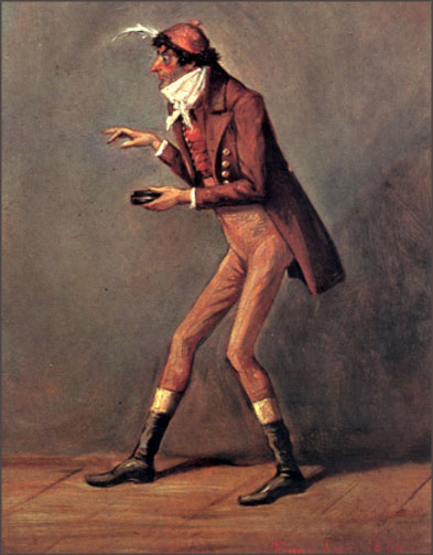 Johann Nepomuk Nestroy als „Tratschmiedl“title QS:P1476,de:"Johann Nepomuk Nestroy als „Tratschmiedl“" label QS:Lde,"Johann Nepomuk Nestroy als „Tratschmiedl“"